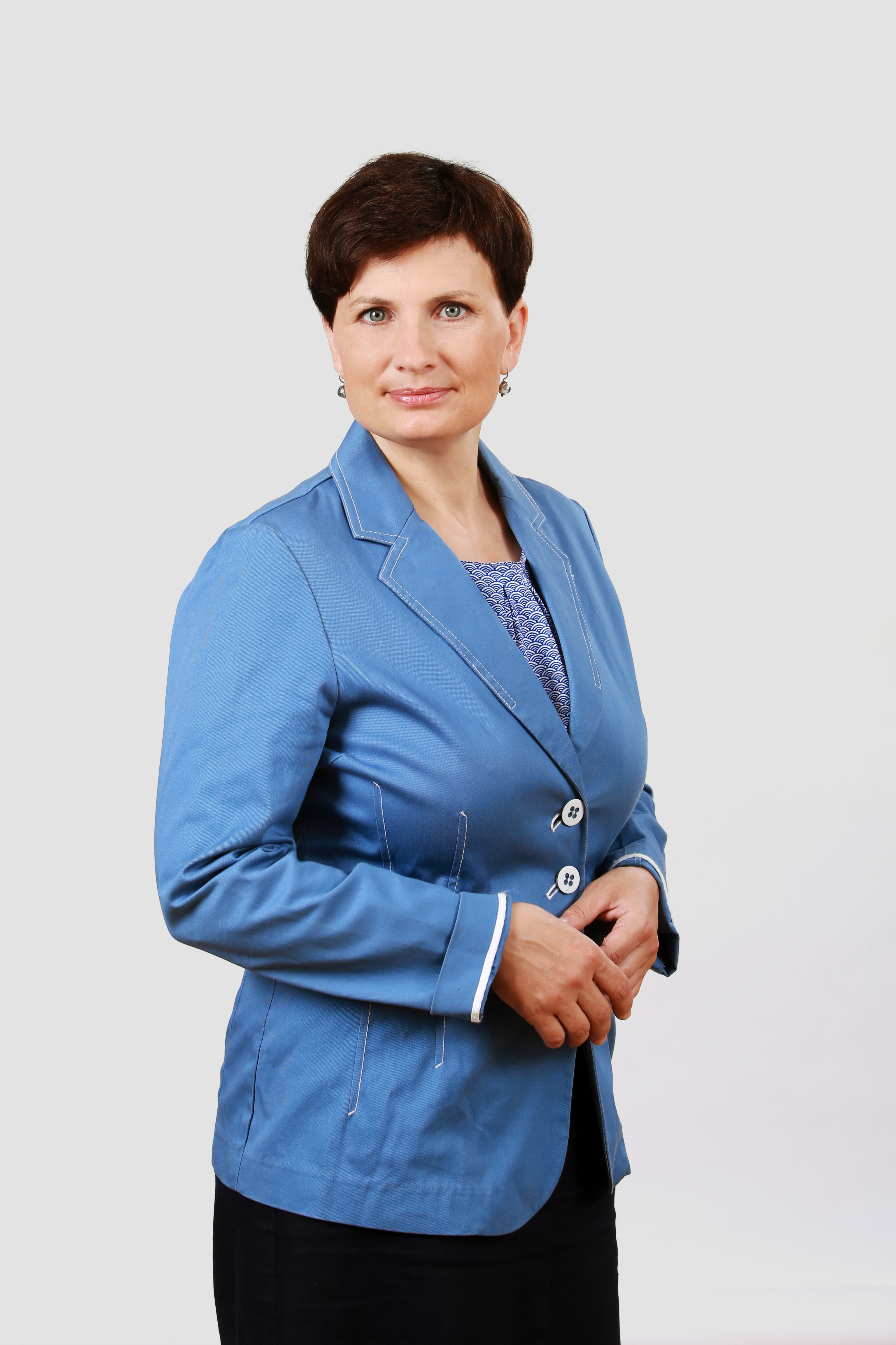 2014.gada 9.decembris. 12.Saeimas deputāte Ilze Vinķele. Foto: Partijas Vienotība publicitātes foto